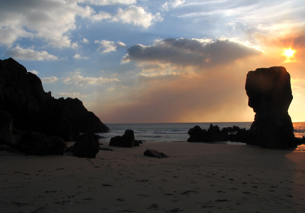 Praia de Lumebo. Ferrol, Galiza